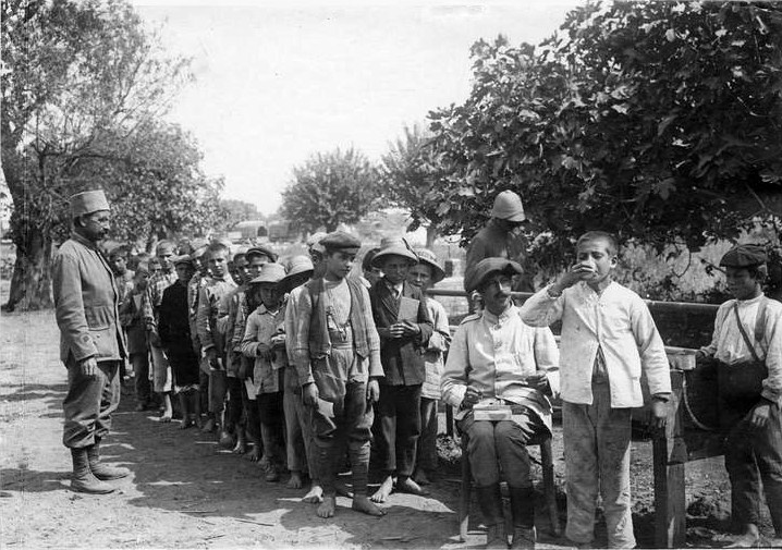 École_des_réugiés_d'Asie_mineure_et_de_Macédoine_où se fait une distribution_de_quinine_août_1916.